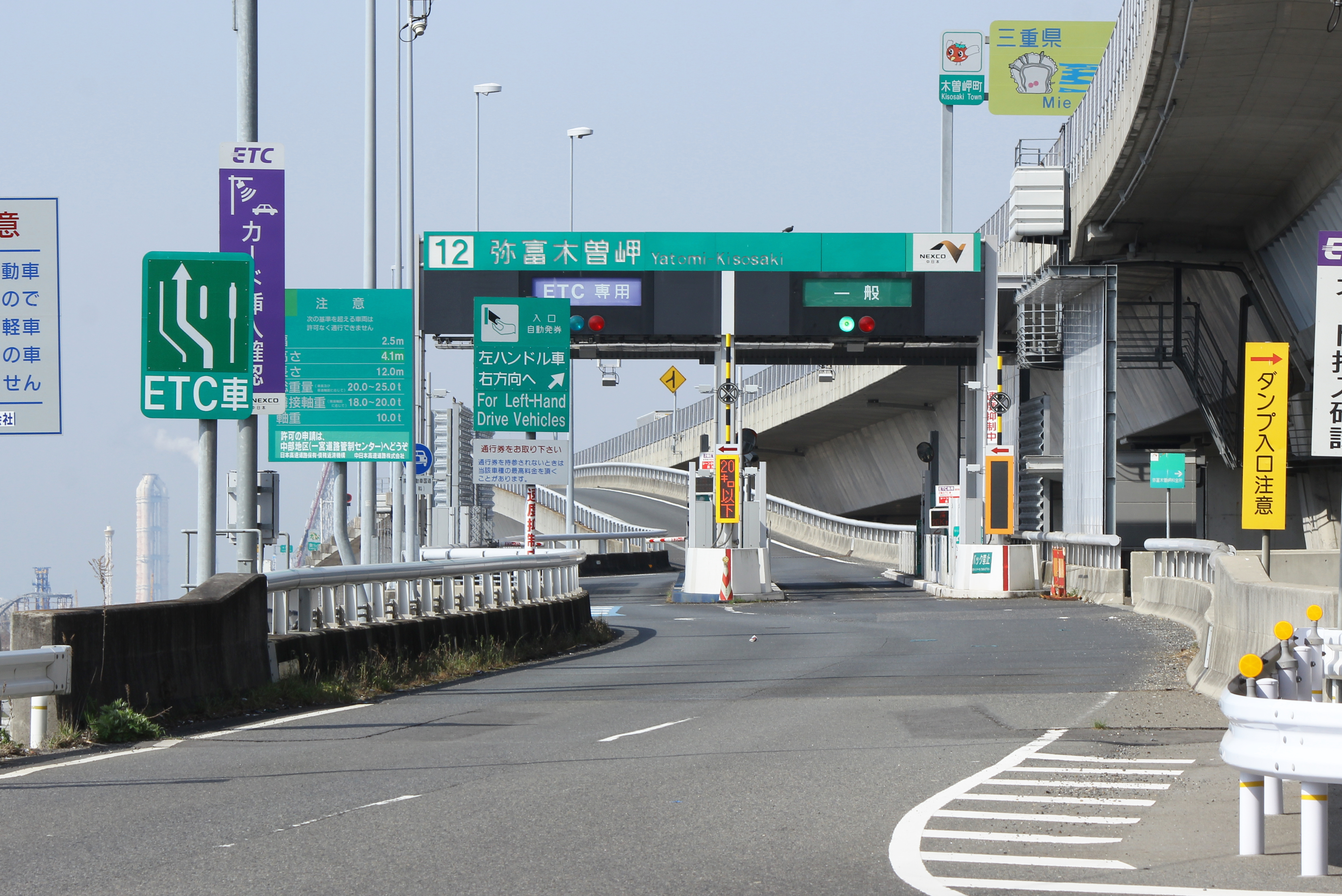 伊勢湾岸自動車道（第二名神）弥富木曽岬インターチェンジ